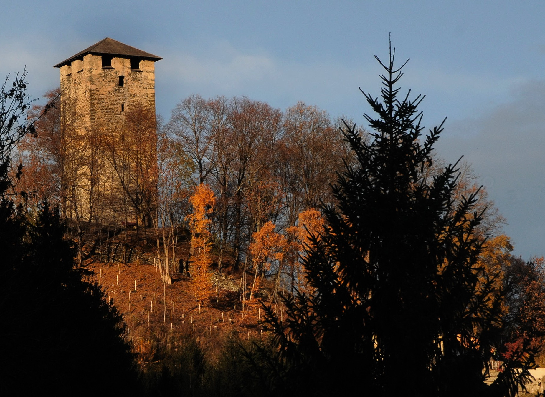 Pfaffenhofen: Burgruine Hörtenberg Dieses Bild wurde anlässlich des österreichischen Tags des Denkmals 2012 in Tirol eingereicht.